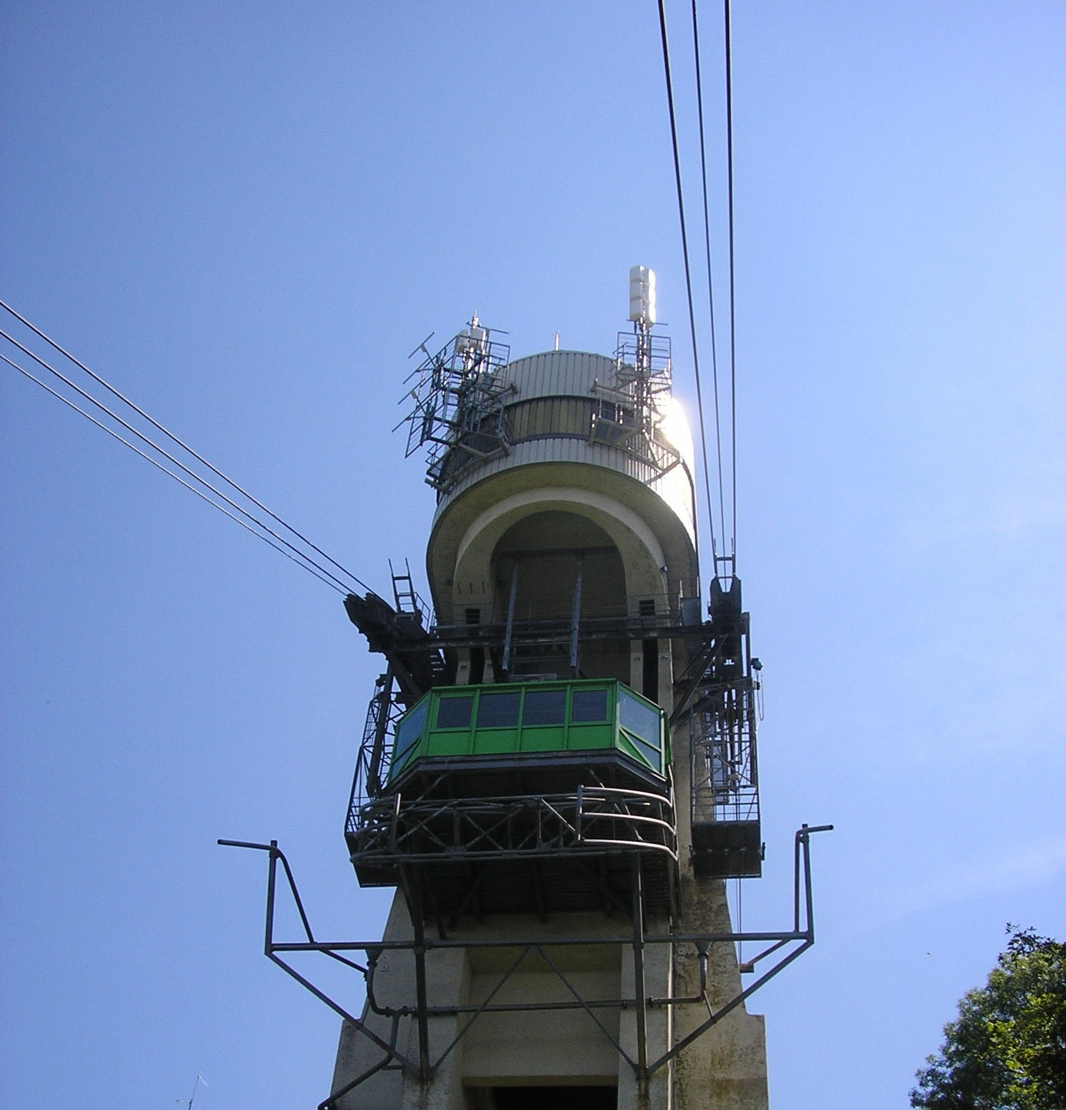 Téléphérique du Salève. Station réalisée par l'architecte Maurice Braillard en 1932.